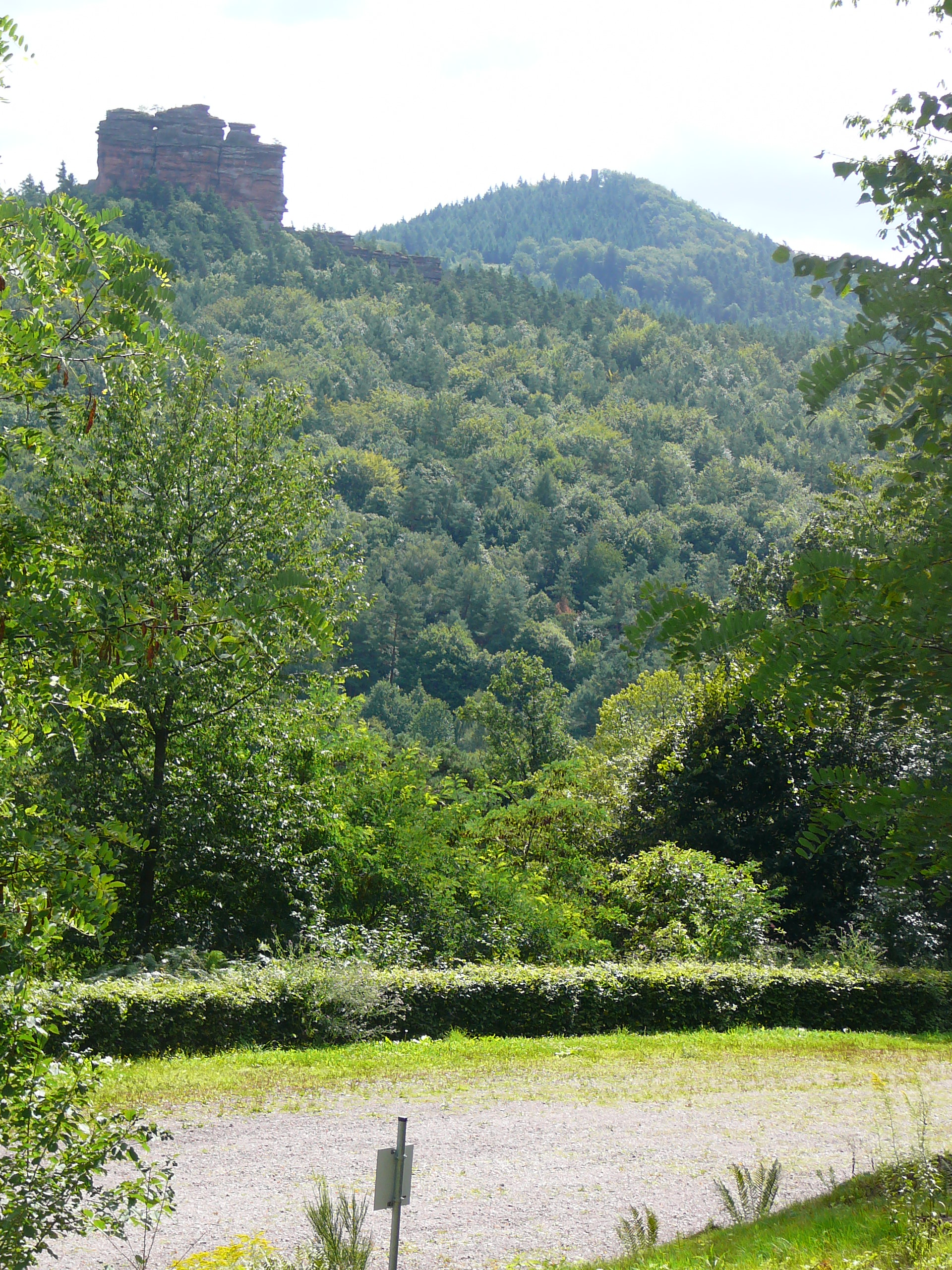 Die Rehbergregion mit hoher biokklimatischer Bedeutung: Blick von der Trifelsstraße auf Rehberg und Asselstein